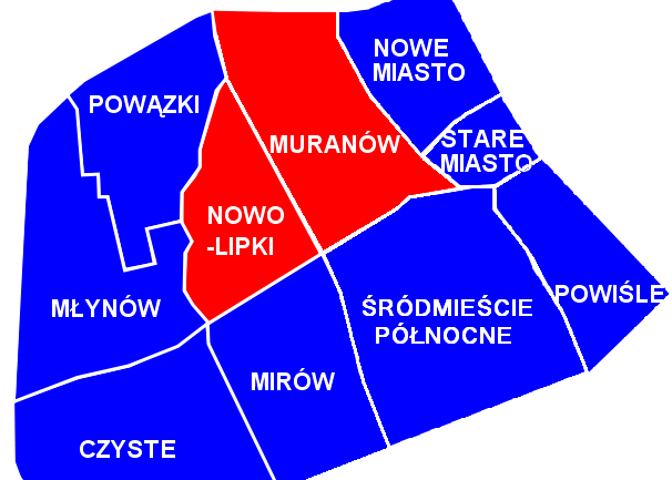 Muranów